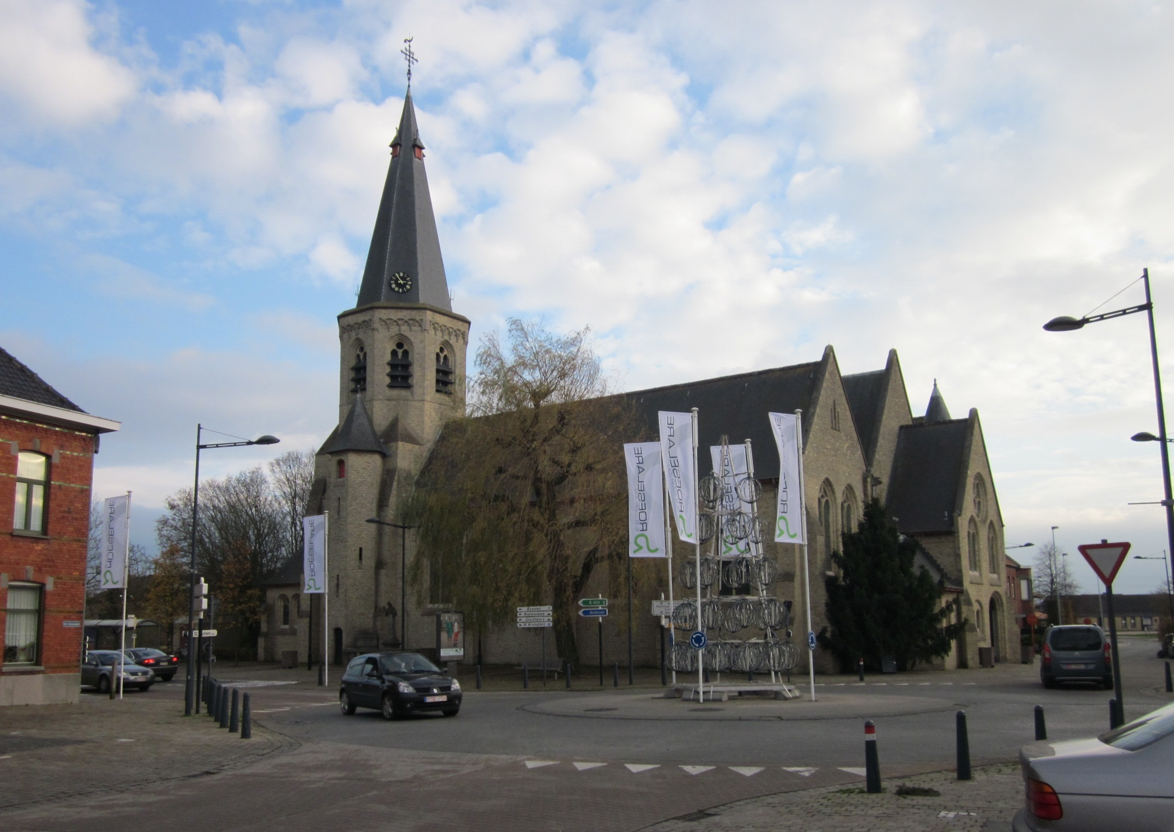 Heilige-Kruisverheffingskerk in Beveren (Roeselare) 74″ N, 3° 08′ 41.24″ E